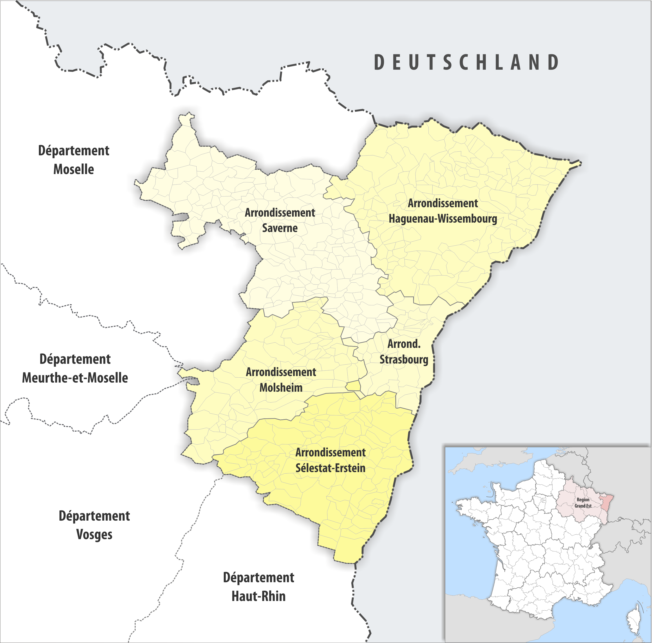 Gemeinden und Arrondissemente im Departement Bas-Rhin